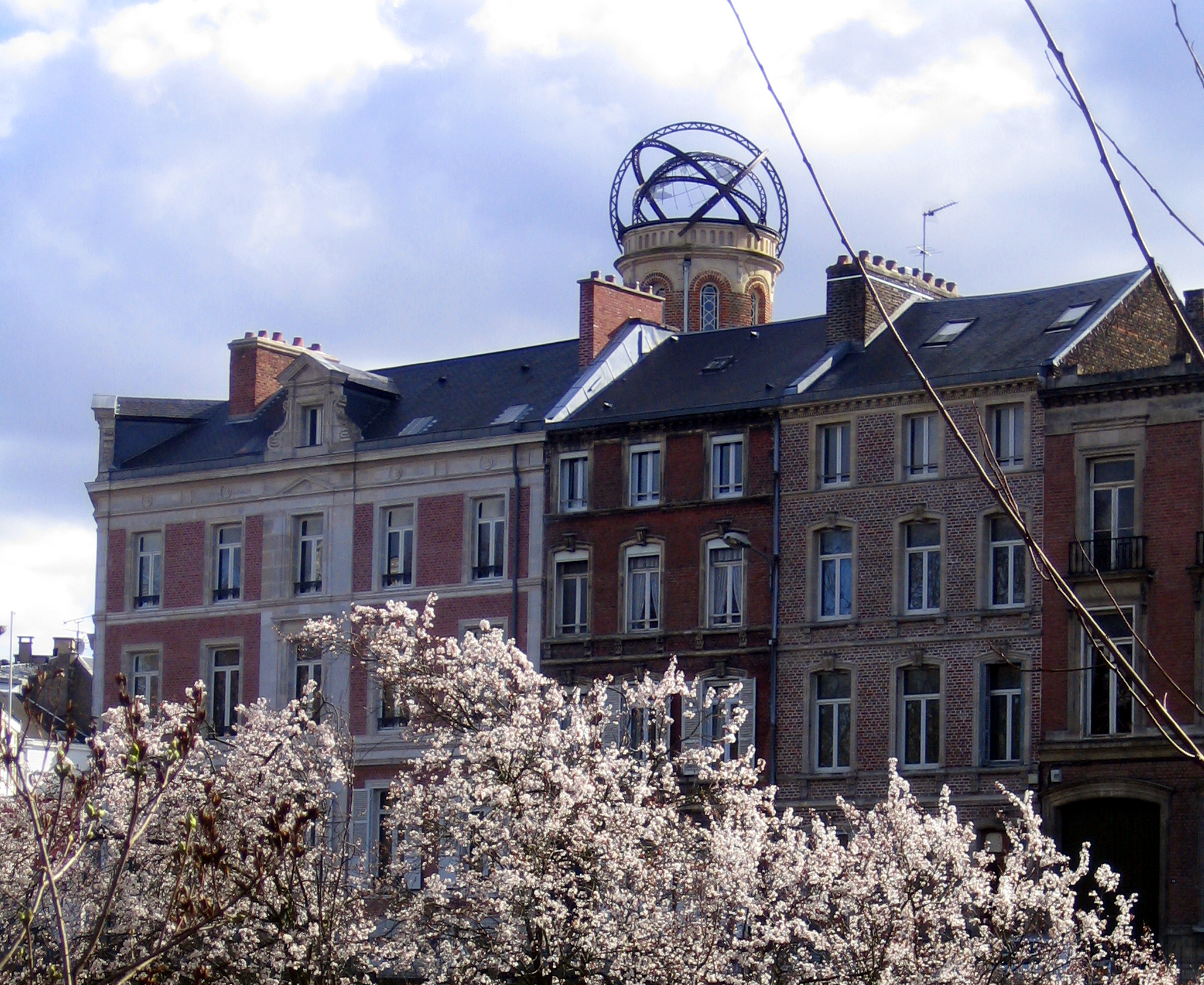 Amiens (Somme, France) - La tour de la Maison de Jules Verne vue depuis le Mail Albert 1er. Elle dépasse les toits des maisons du Boulevard Jules Verne construites le long de la voie ferrée qui, bordée d'arbres, s'enfonce (vers la gauche) dans un tunnel avant de rejoindre la Gare du Nord.